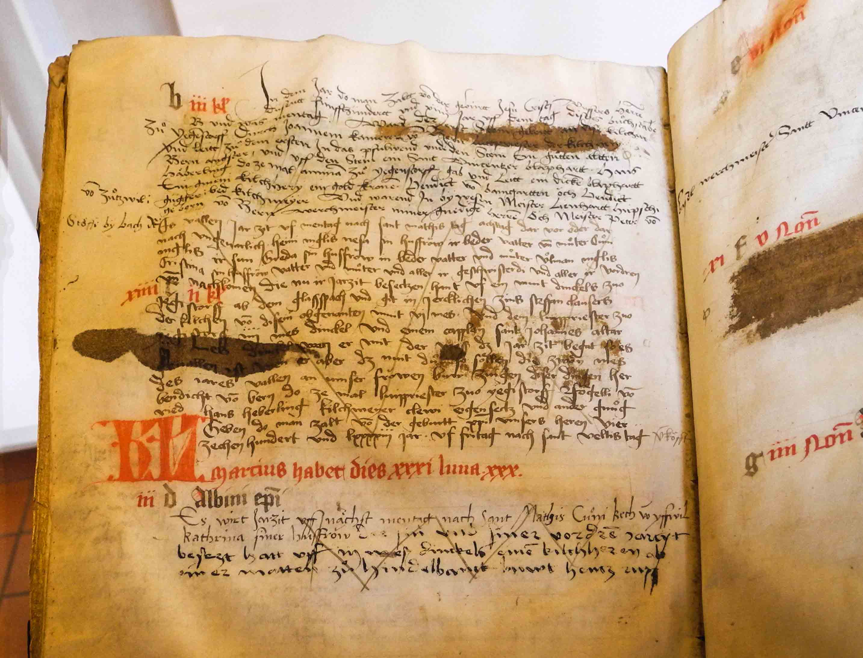 Ausstellung 500 Jahre Kirche Jegenstorf Ausschnitt Jahrzeitenbuch